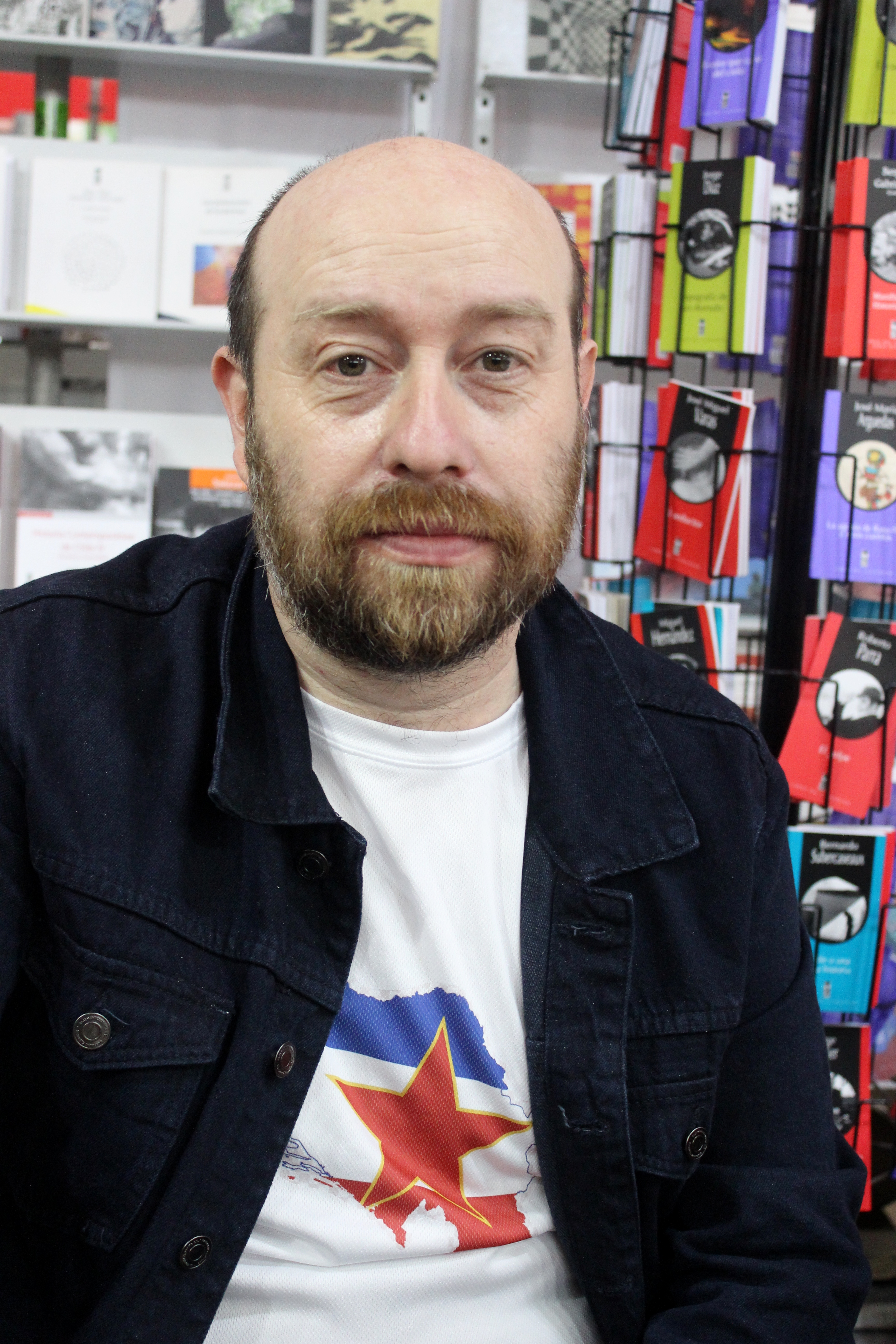 El escritor chileno Óscar Barrientos en el stand de LOM en la Feria Internacional del Libro de Santiago 2018.